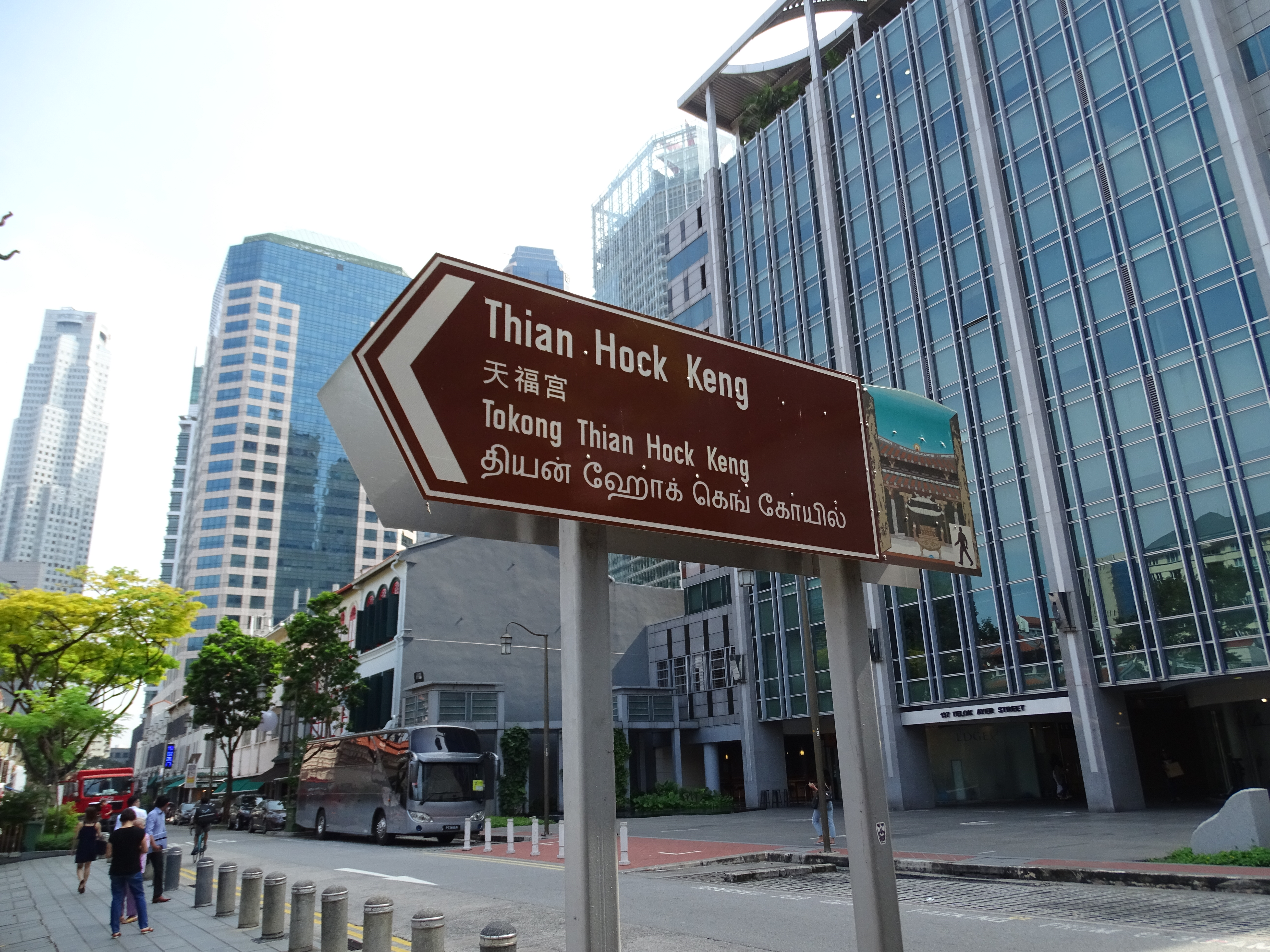 Hochhaus 137 Telok Ayer Street (rechts im Hintergrund), ein Gebäude der Gesellschaft Singapore Hokkien Huay Kuan, gegenüber dem Tempel Thian Hock Keng, China Town, Singapore